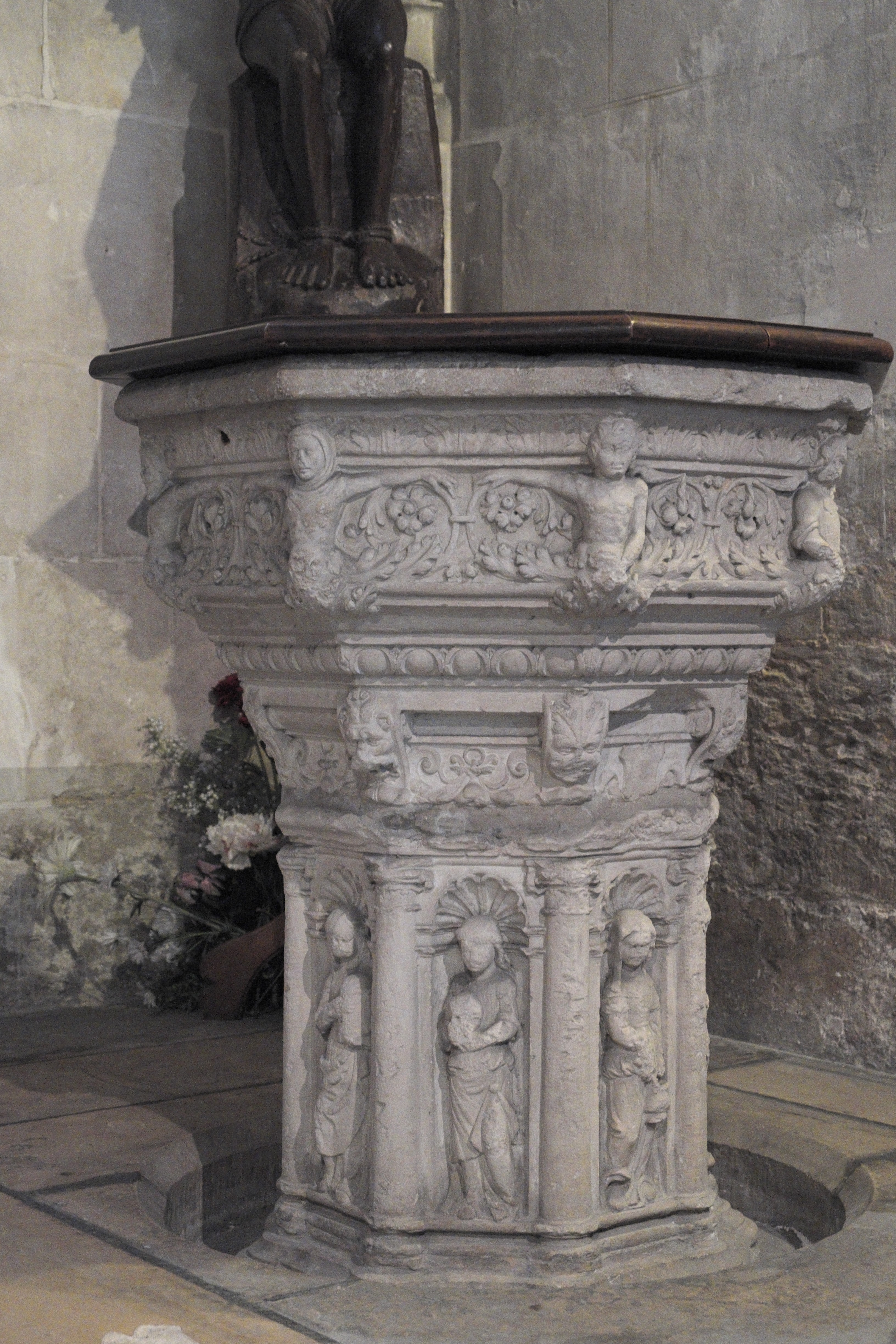 Katholische Kirche Saint-Ouen in Pont-Audemer im Département Eure (Haute-Normandie/Frankreich), Taufbecken aus dem 16. Jahrhundert